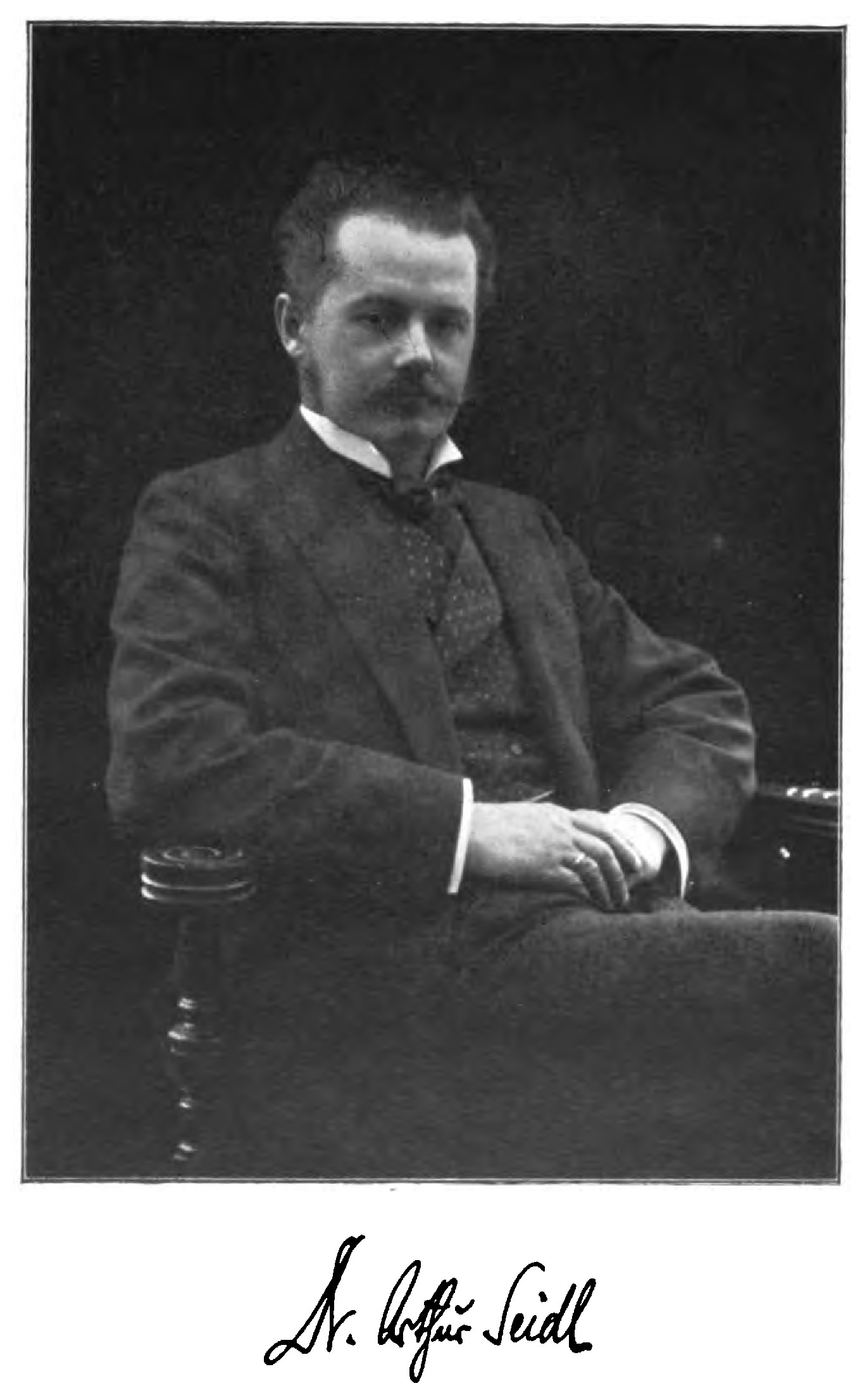 Arthur Seidl. In: Kunst und Kultur: aus der Zeit, für die Zeit, wider die Zeit! Berlin und Leipzig: Schuster & Loeffler, 1902